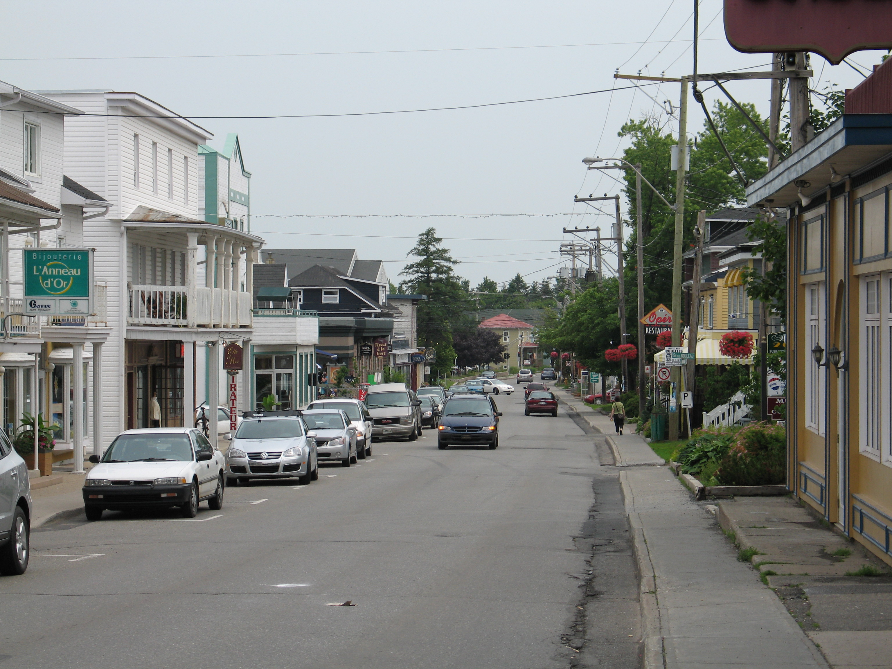 Le centre-ville de La Pocatière, au Québec.